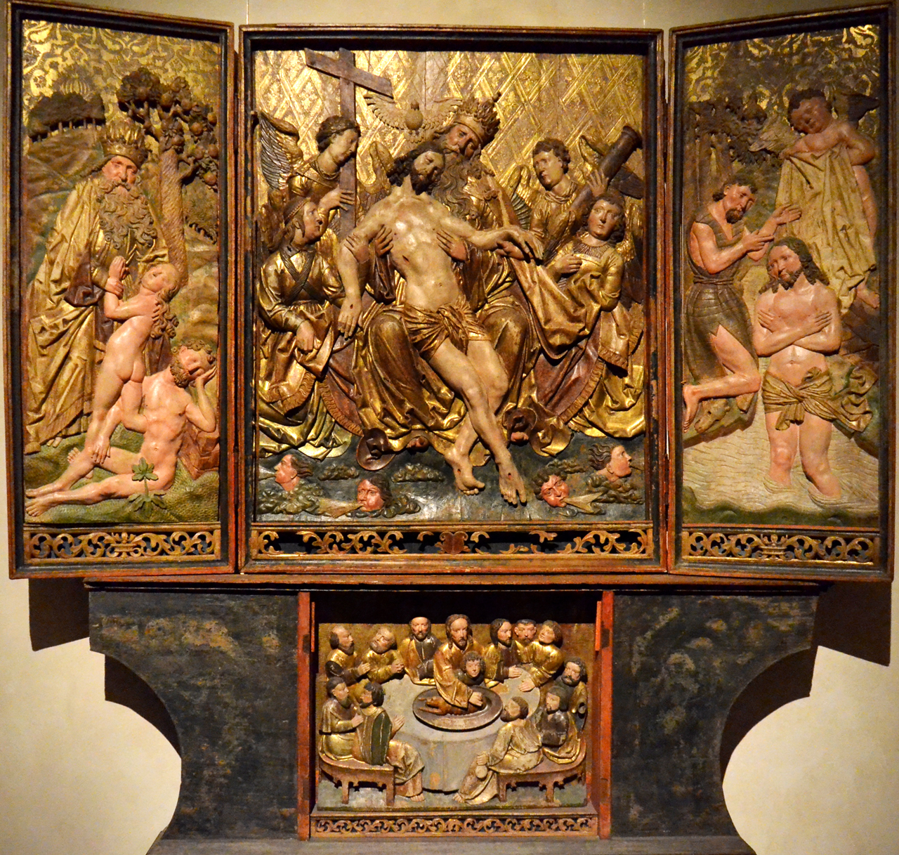 Mistr oltáře ze Štětí: Archa ze Štětí (1520-1530)